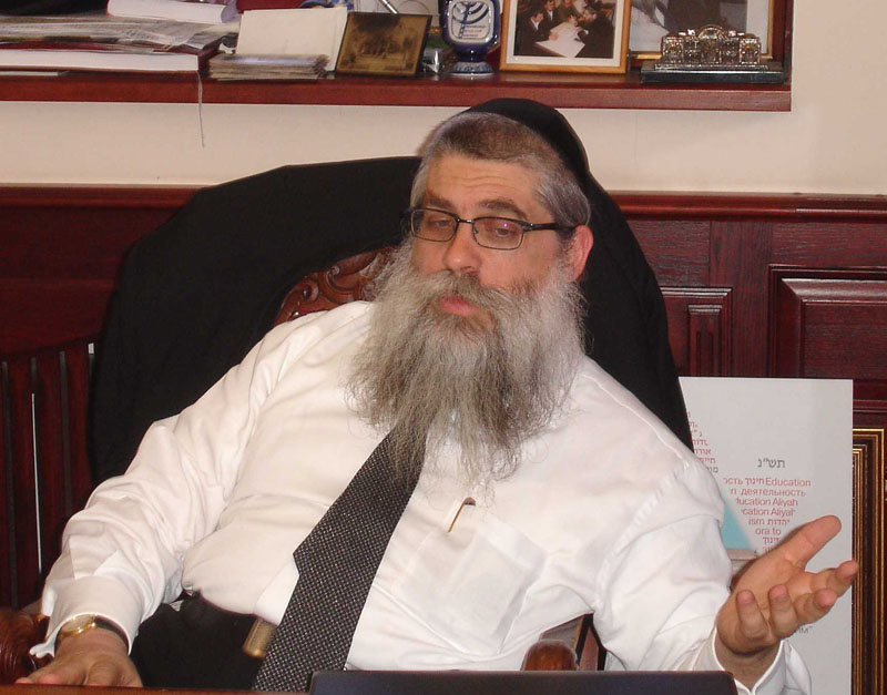 раввин Яков Дов Блайх